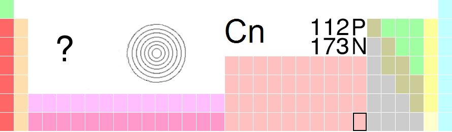 Periodic Table - Ununbium